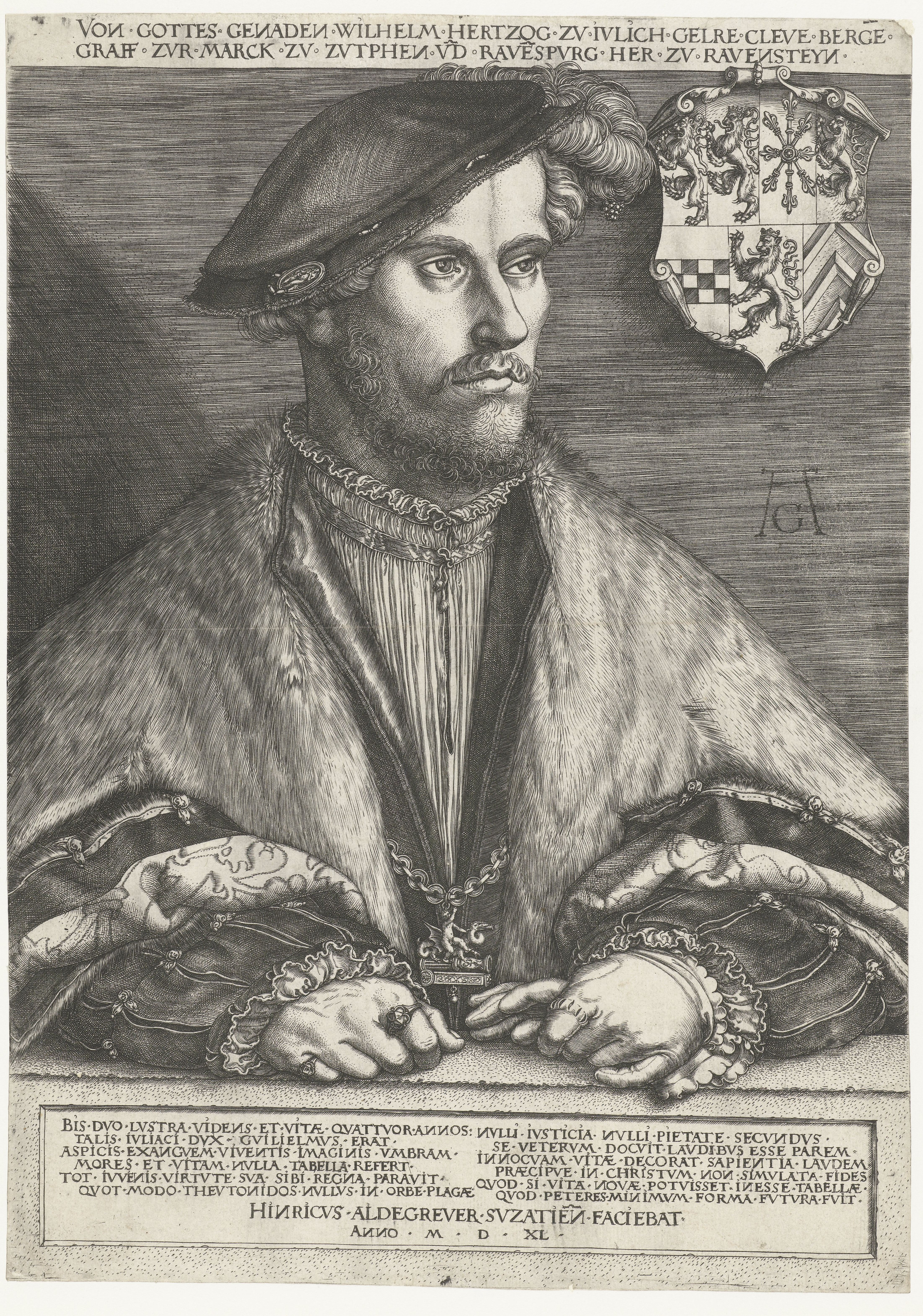 IdentificatieTitel(s): Portret van Willem II, hertog van Gelre, Kleef, Gulik en BergVon Gottes Genaden Wilhelm Hertzog zu Iulich Gelre Cleve Berge Graff zur Marck zu Zutphen u(n)d Rave(n)spurg Her zu Ensteyn (titel op object)Objecttype: prent Objectnummer: RP-P-OB-2807Catalogusreferentie: New Hollstein German (Aldegrever) 181-1(3)The Illustrated Bartsch 181Opschriften / Merken: verzamelaarsmerk, verso midden, gestempeld: Lugt 2228nummer, verso midden onder, handgeschreven: ‘138’Omschrijving: Portret van Willem II, hertog van Gelre, Kleef, Gulik en Berg, ten halven lijve. Zijn handen leunend op een balustrade met daarop een tekst in het Latijn van de humanist Helios Eobanus Hessus. Rechtsboven zijn wapenschild.VervaardigingVervaardiger: prentmaker: Heinrich Aldegrever (vermeld op object)naar eigen ontwerp van: Heinrich Aldegreverschrijver: Helius Eobanus HessusPlaats vervaardiging: DuitslandDatering: 1540Fysieke kenmerken: gravureMateriaal: papier Techniek: graveren (drukprocedé)Afmetingen: blad: h 309 mm × b 220 mmOnderwerpWie: Willem II (hertog van Gelre)Verwerving en rechtenVerwerving: overdracht van beheer 1816Copyright: Publiek domein